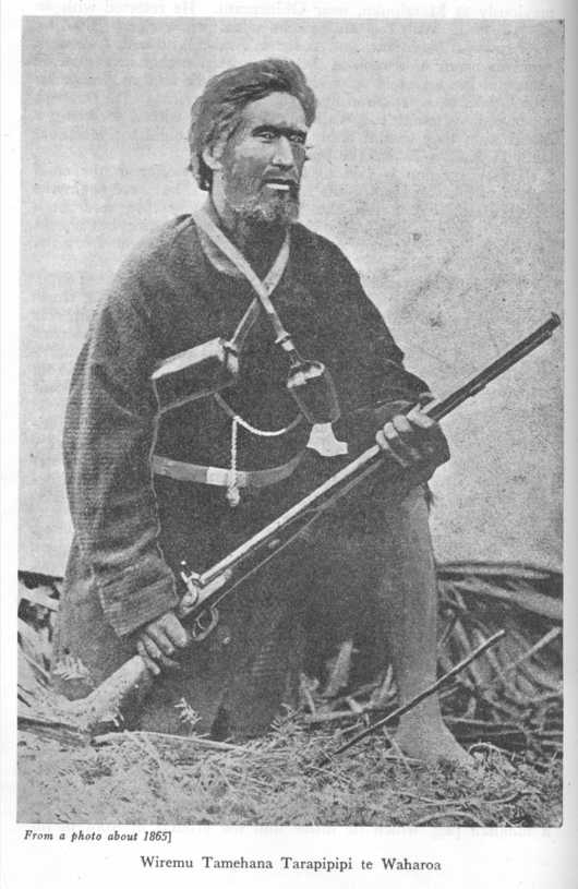 Foto tomada alrededor del año 1865 de Wiremu Tamehana